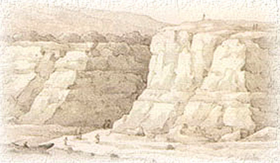 Первое изображение Утёса Степана разина, сделанное художниками Чернецовыми